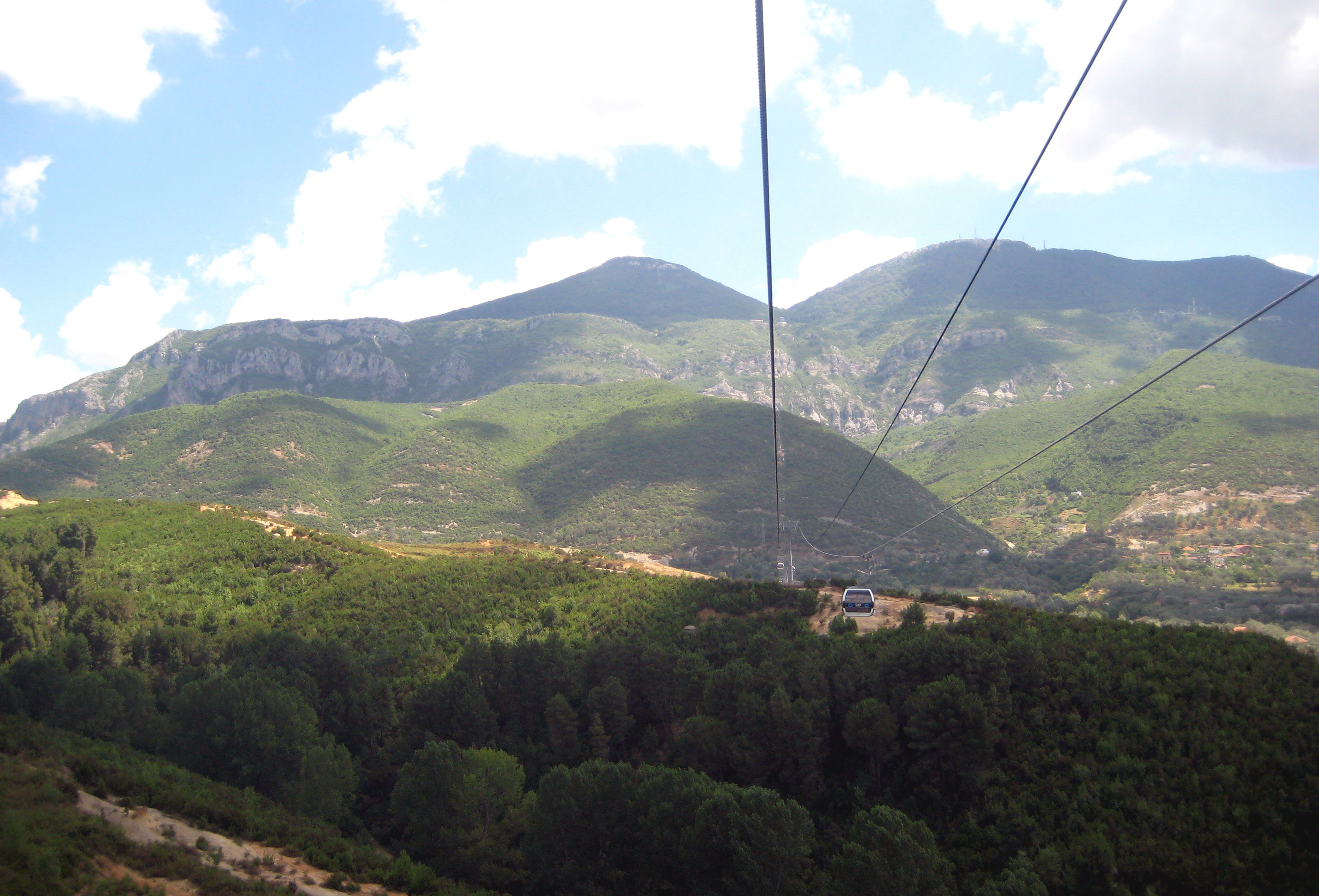 Mount Dajti – Albania